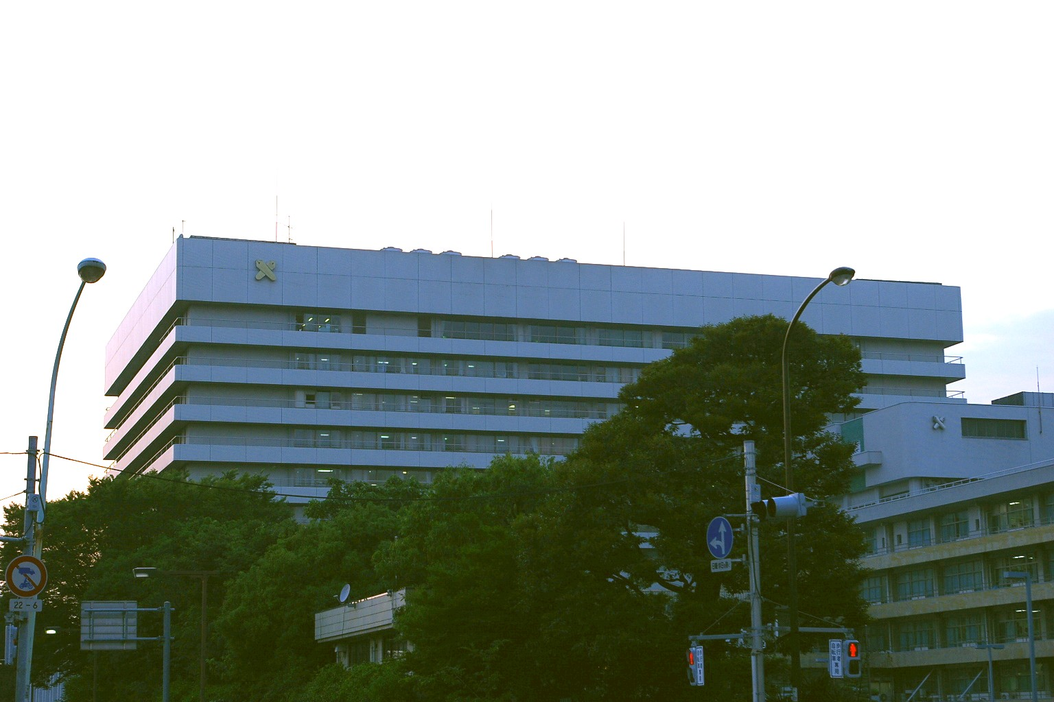 I took it myself.